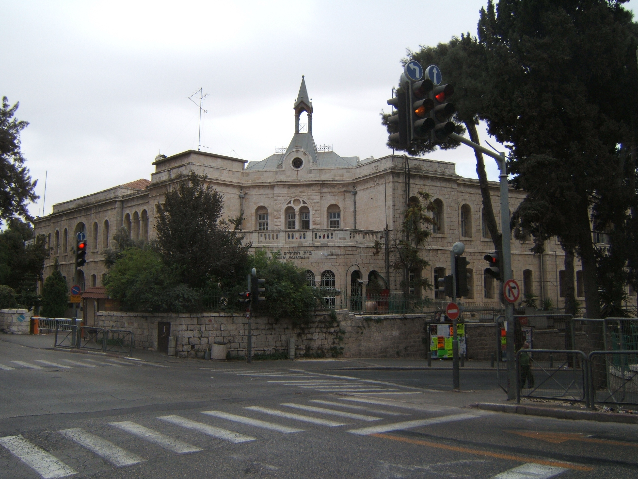 German Hospital, Jerusalem